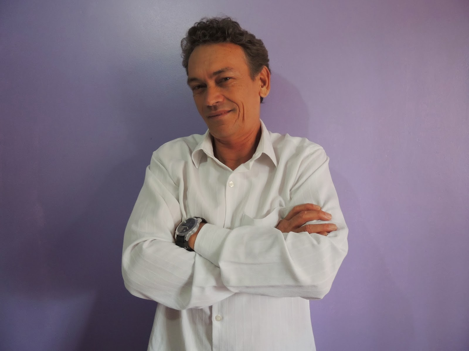 Foto do escritor brasileiro Pedro Paulo de Souza Nunes, tirada pela filha Vanish Sarah do Nascimento Nunes Leite.